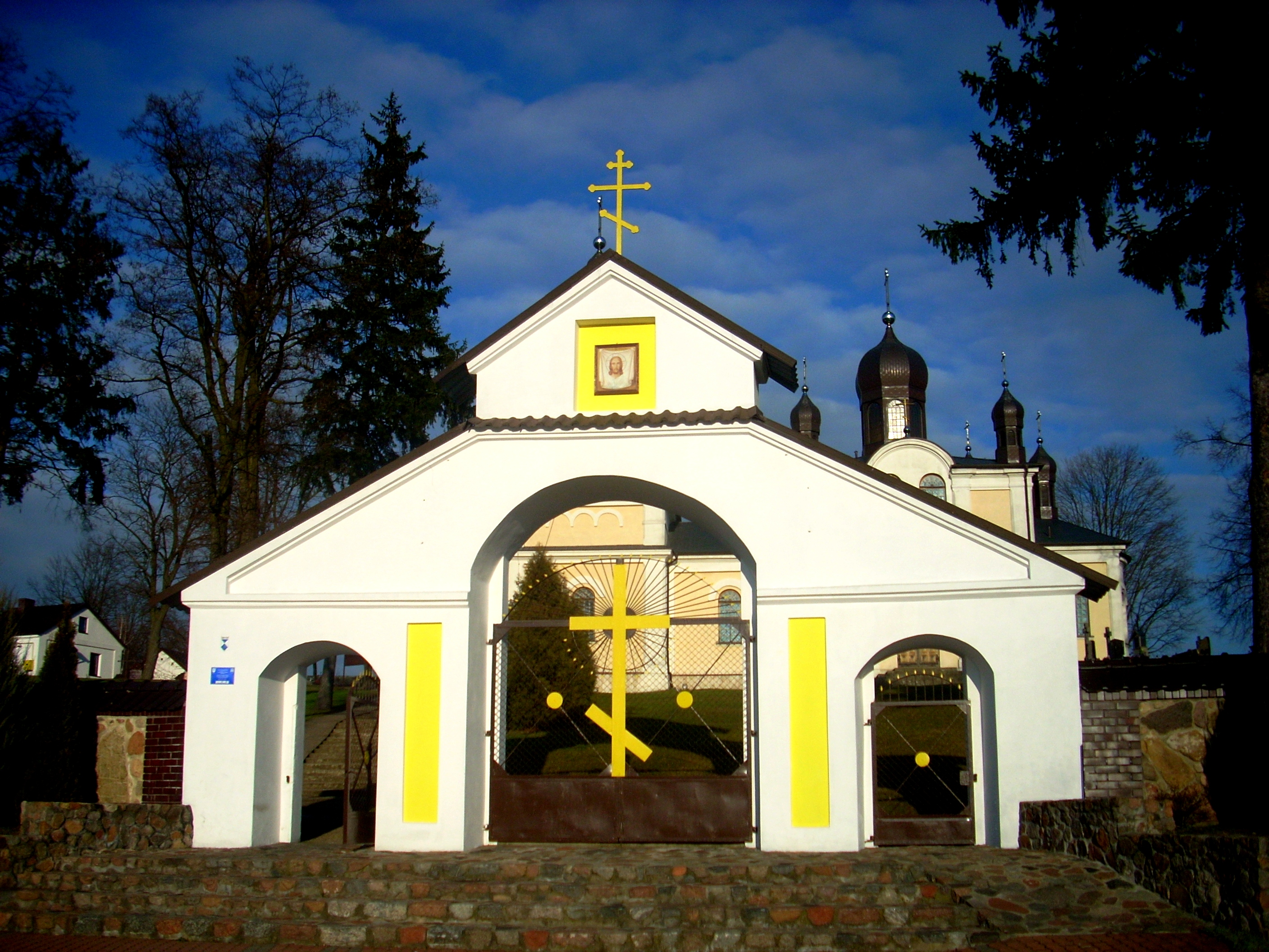 Brama prowadząca na teren cerkwi św. św. Piotra i Pawła w Siemiatyczach